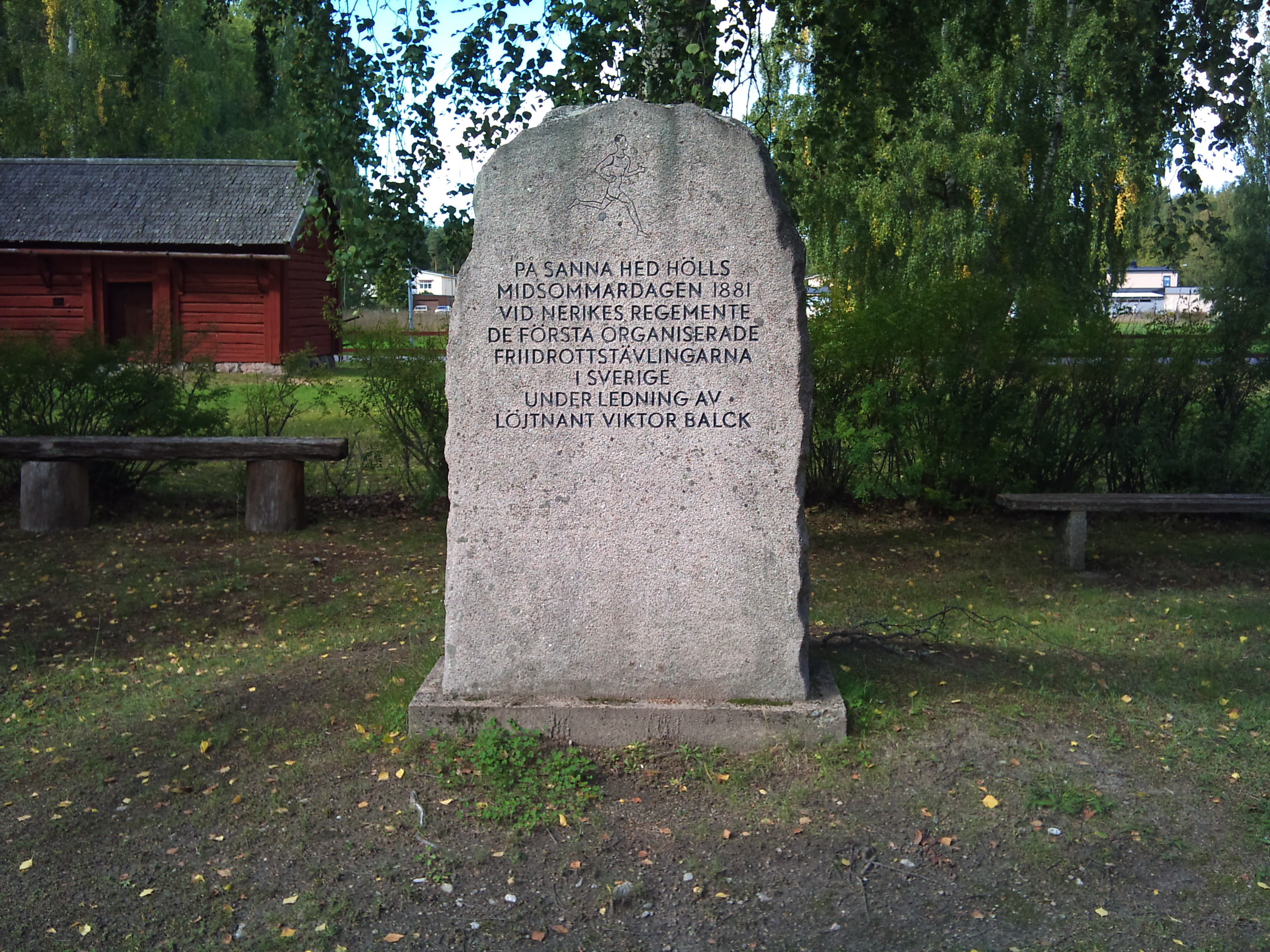 Minnessten i Sannahed, Kumla. Texten på stenen lyder: På Sannahed hölls midsommardagen 1881 vid Nerikes regemente de första organiserade friidrottstävlingarna i Sverige under ledning av Löjtnant Viktor Balck